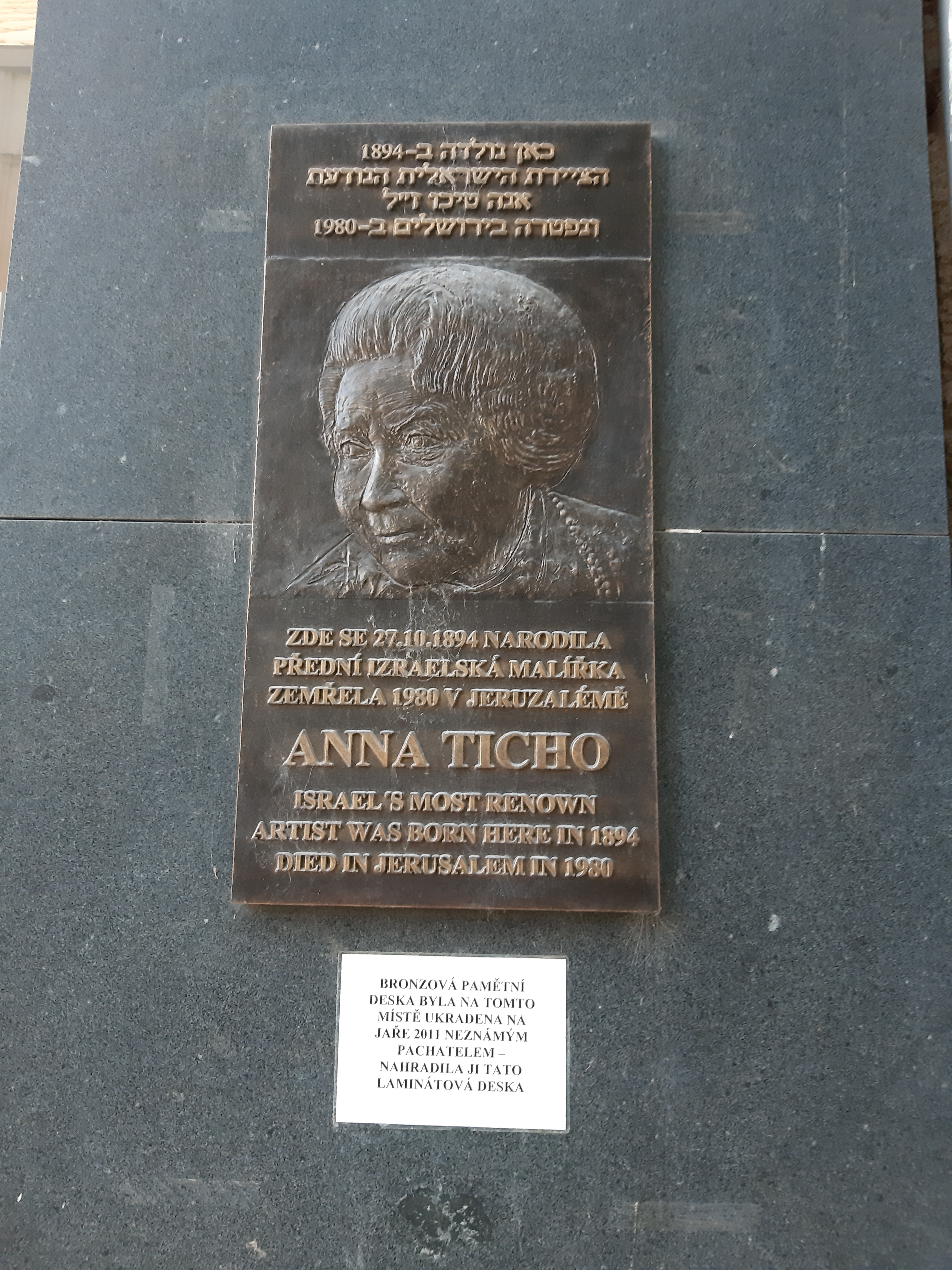 Plaketa věnovaná Anně Ticho, kousek od Masaryčky v Brně, Zelný trh 320/21.